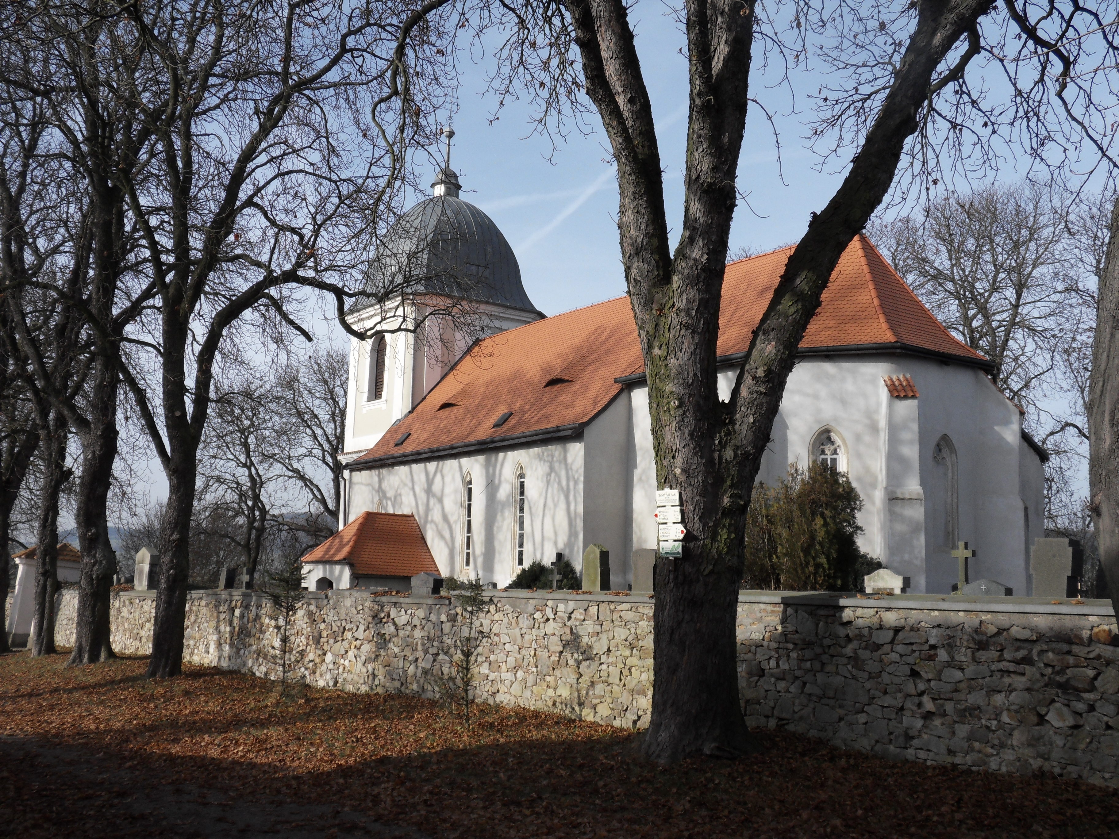 Kostel sv. Štěpána, na návrší východně od města Mýta, okr.Rokycany